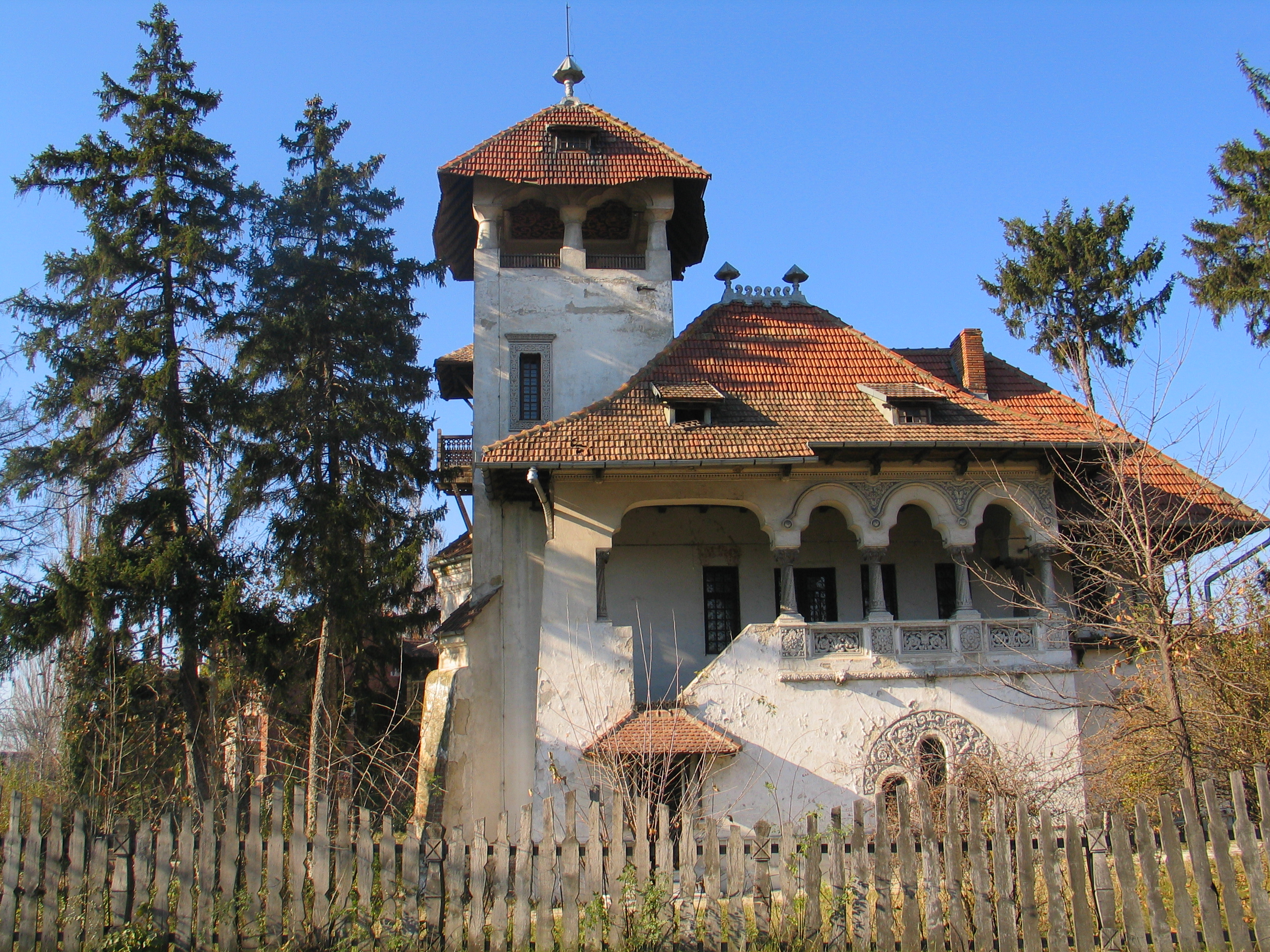 Casa cu Clopotei (Minovici), Bucuresti